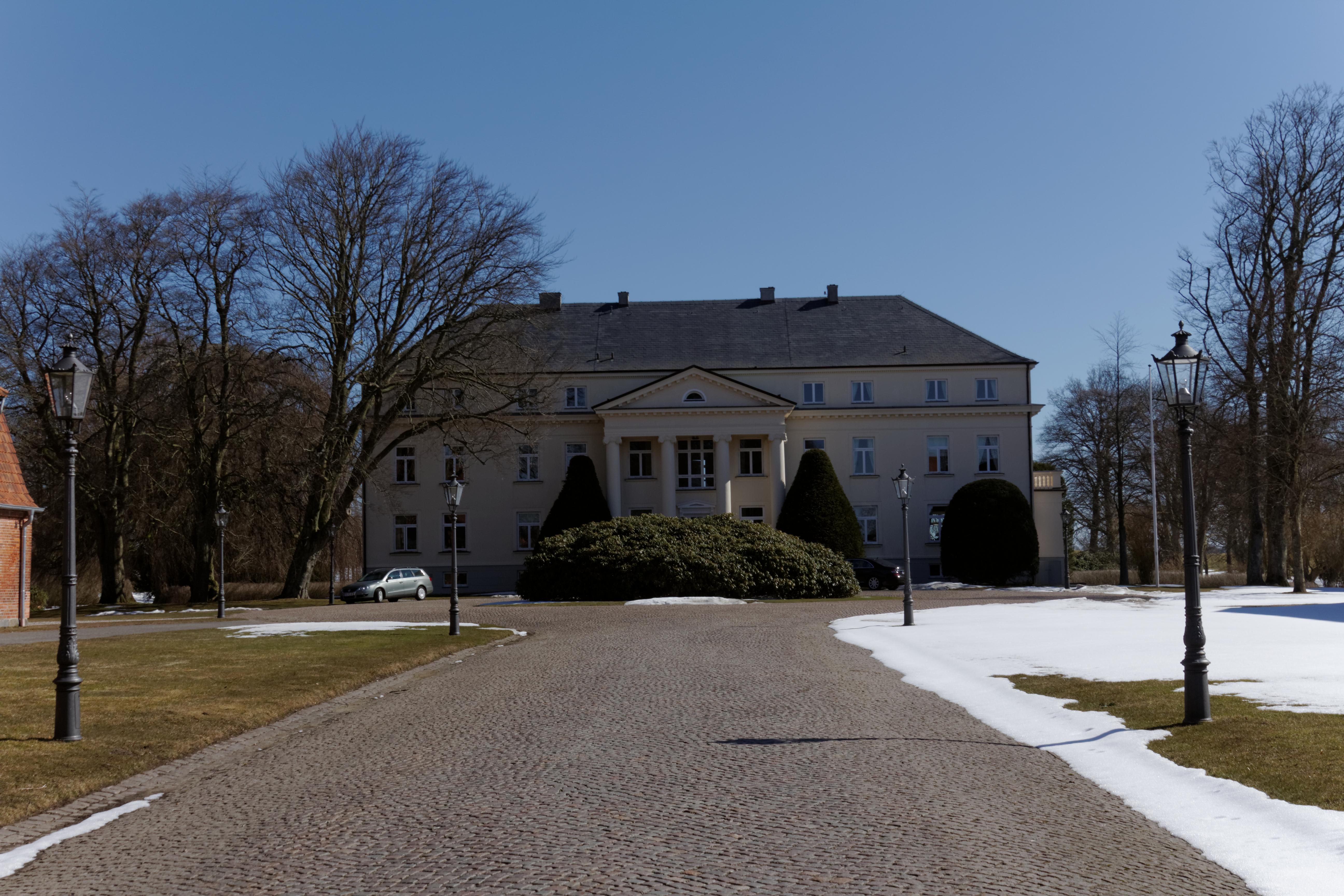 Rieseby, Gut Hörst; Herrenhaus